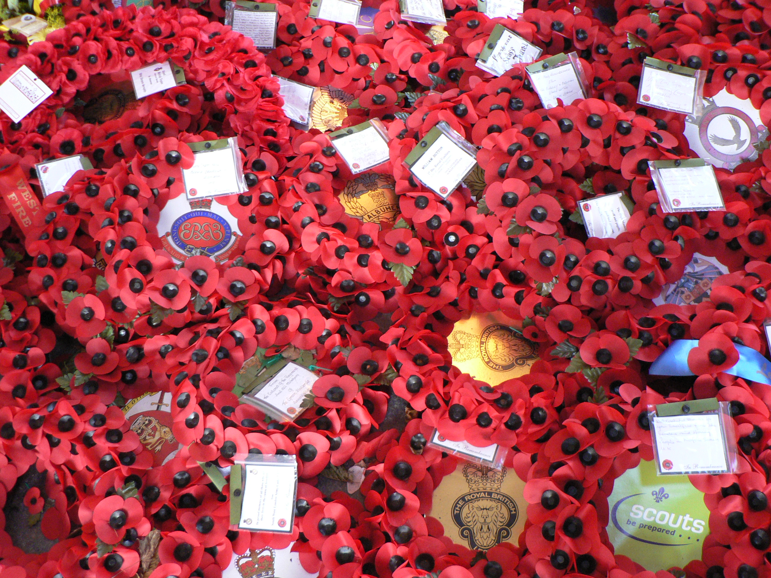 Red poppies - Menin Gate, Ypres, Belgium